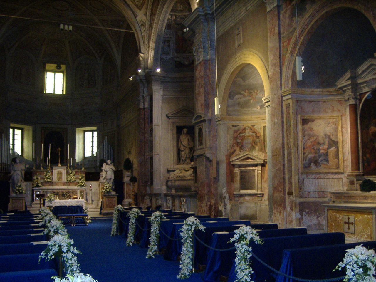 San Pietro in Montorio (Rome)